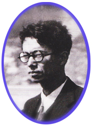 杉健一「日本の新鉱物」より転写